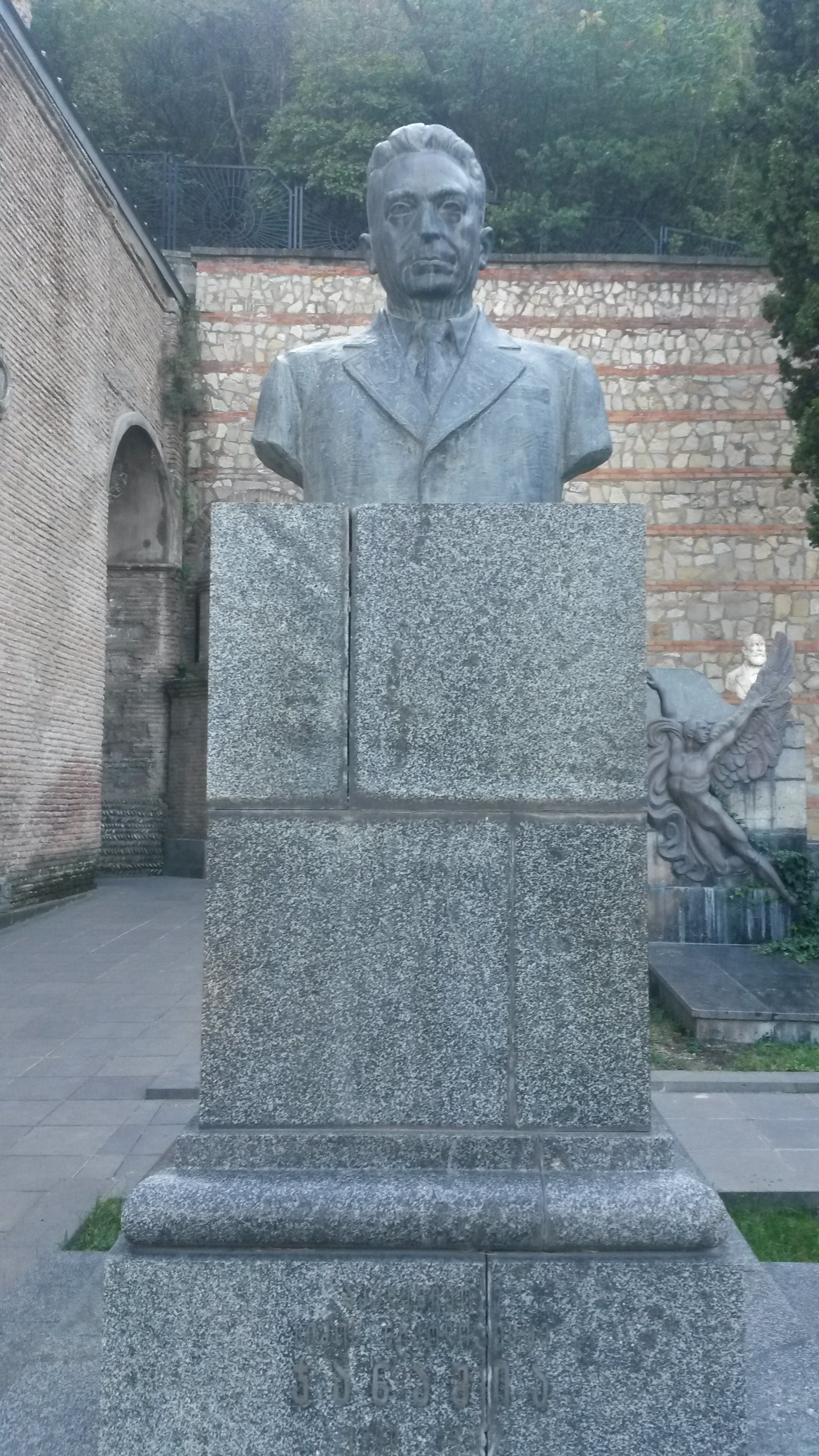 მთაწმინდის პანთეონი